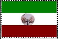 Escudo oficial del Municipio de Tuchín (Córdoba-Colombia)